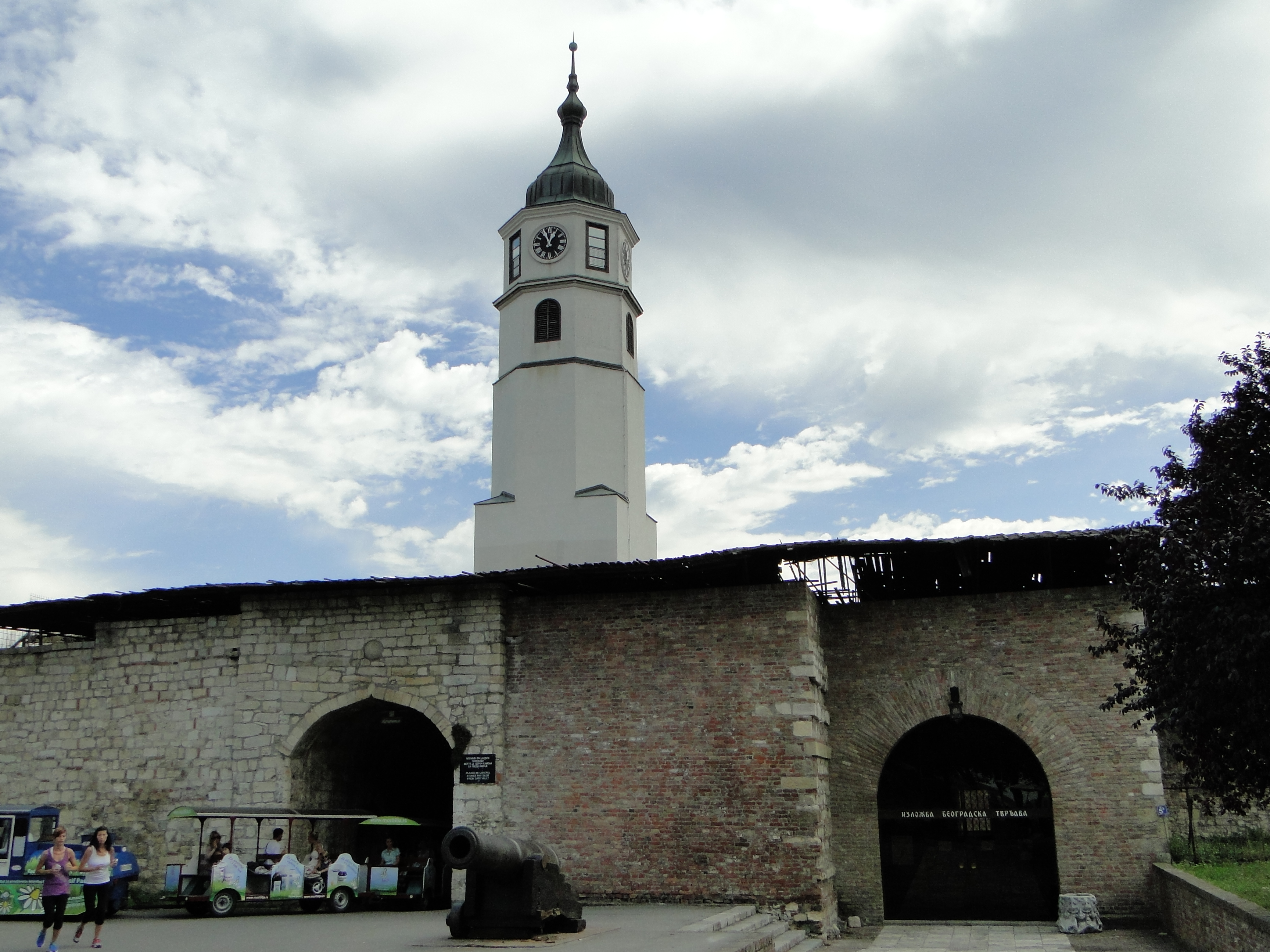 Beograd 2013